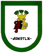 Escudo de Jonotla